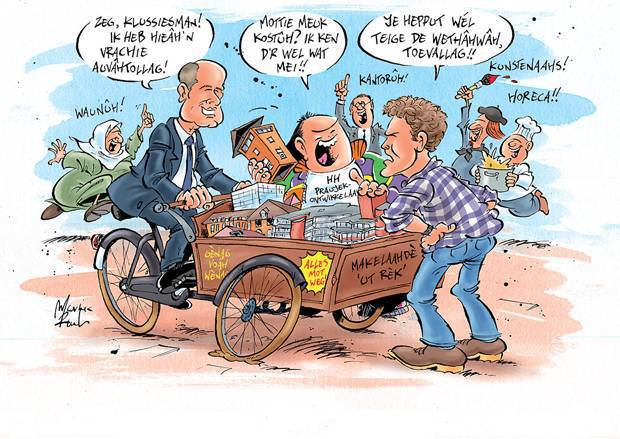 Cartoon Haagse Harry over verhuizing Haagse ministeriegebouwen getekend door Marnix Rueb